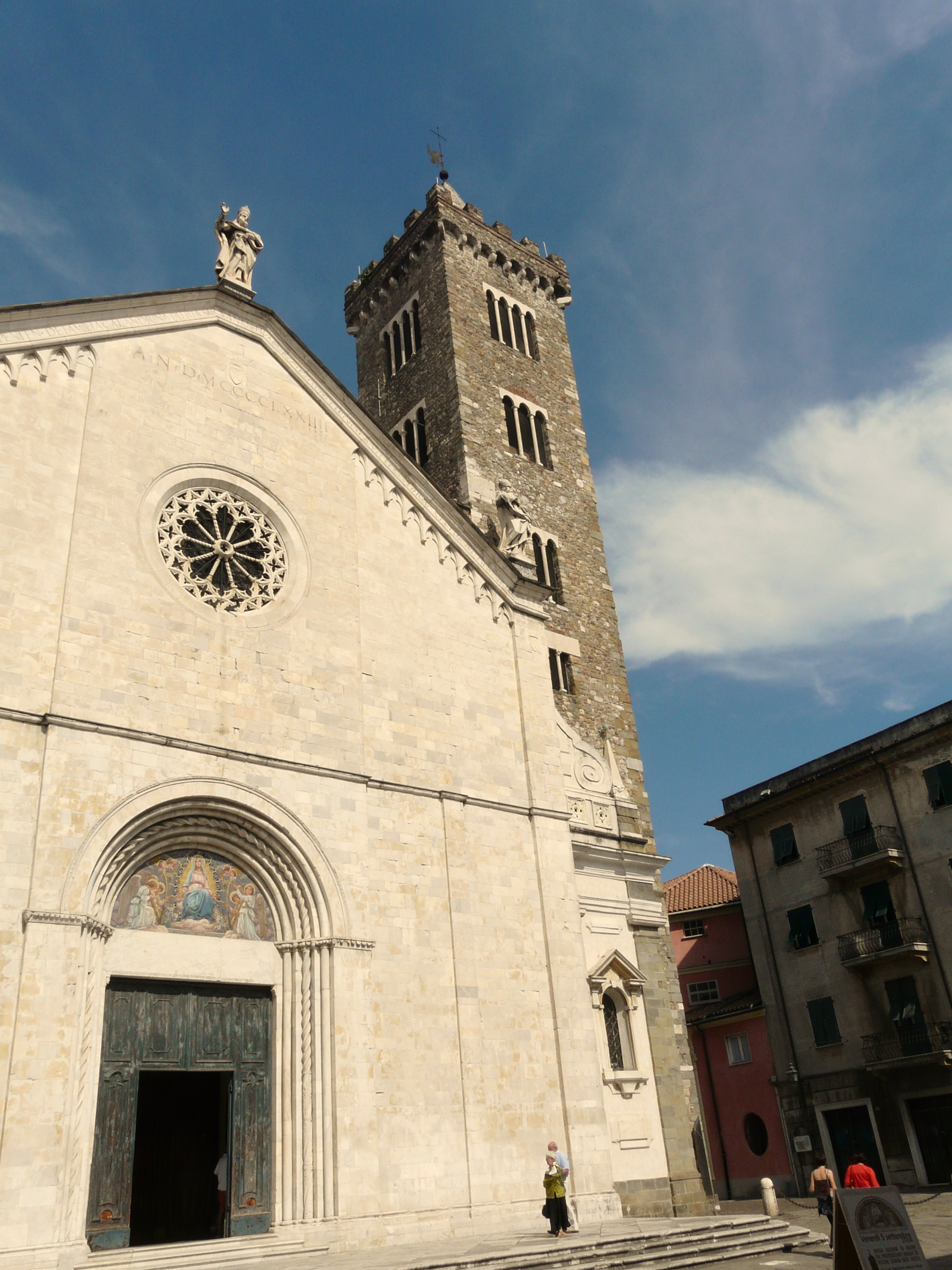 Facciata della Cattedrale di Santa Maria Assunta, Sarzana, Liguria, Italia